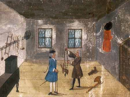 Deposition, Stammbuchblatt Jena 1740, Rechte abgelaufen, Public Domain